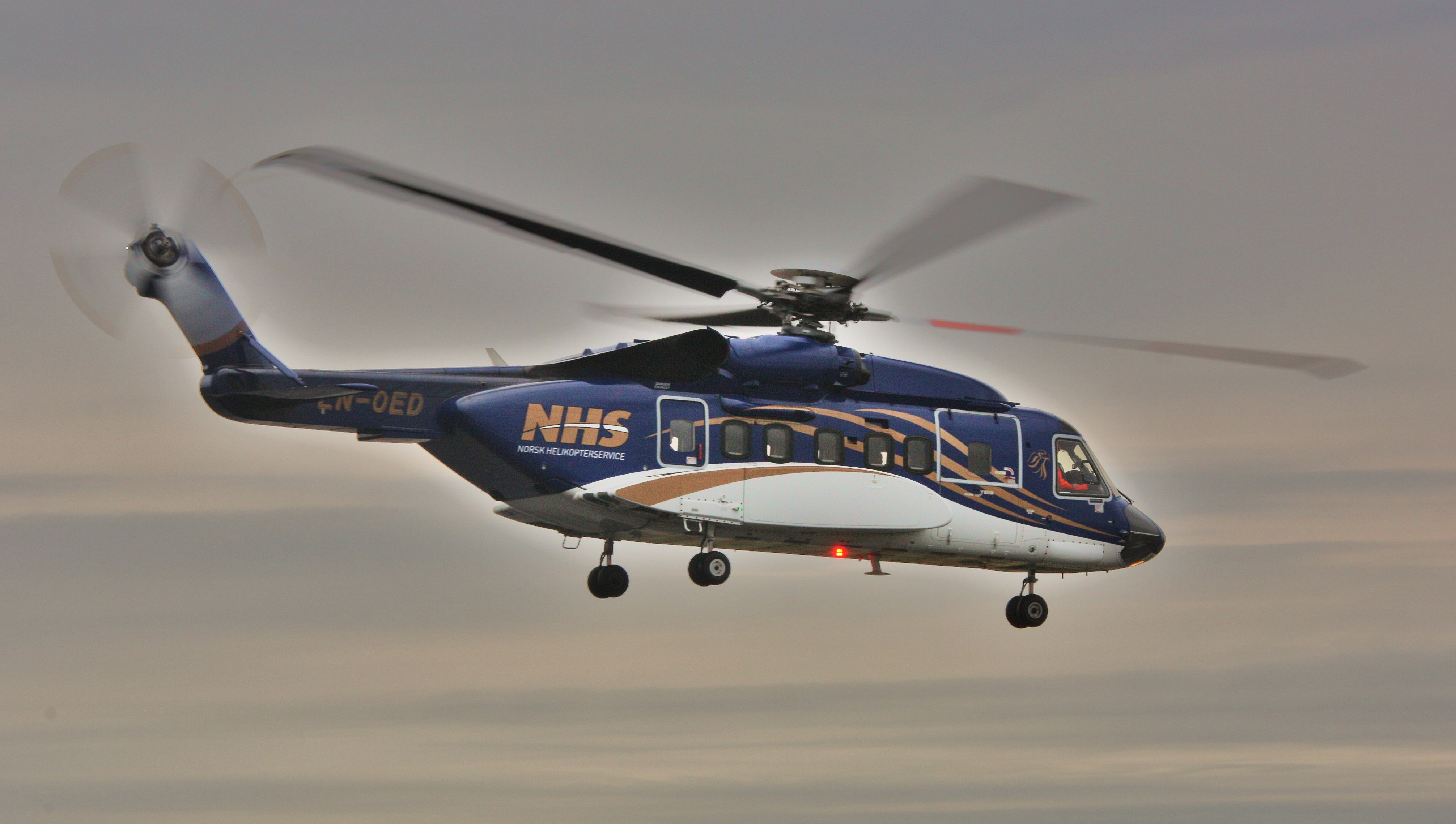 Departing Sumburgh